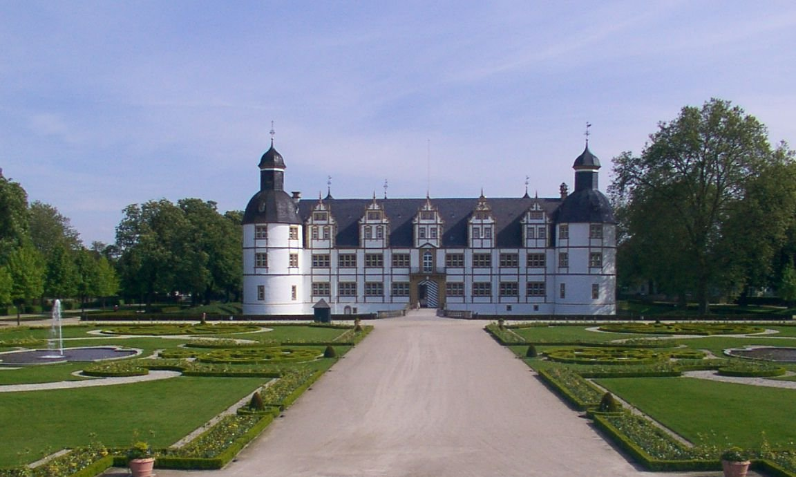 Paderborn, Stadtteil Schloß Neuhaus: Gartenfront des Schlosses im Mai 2005